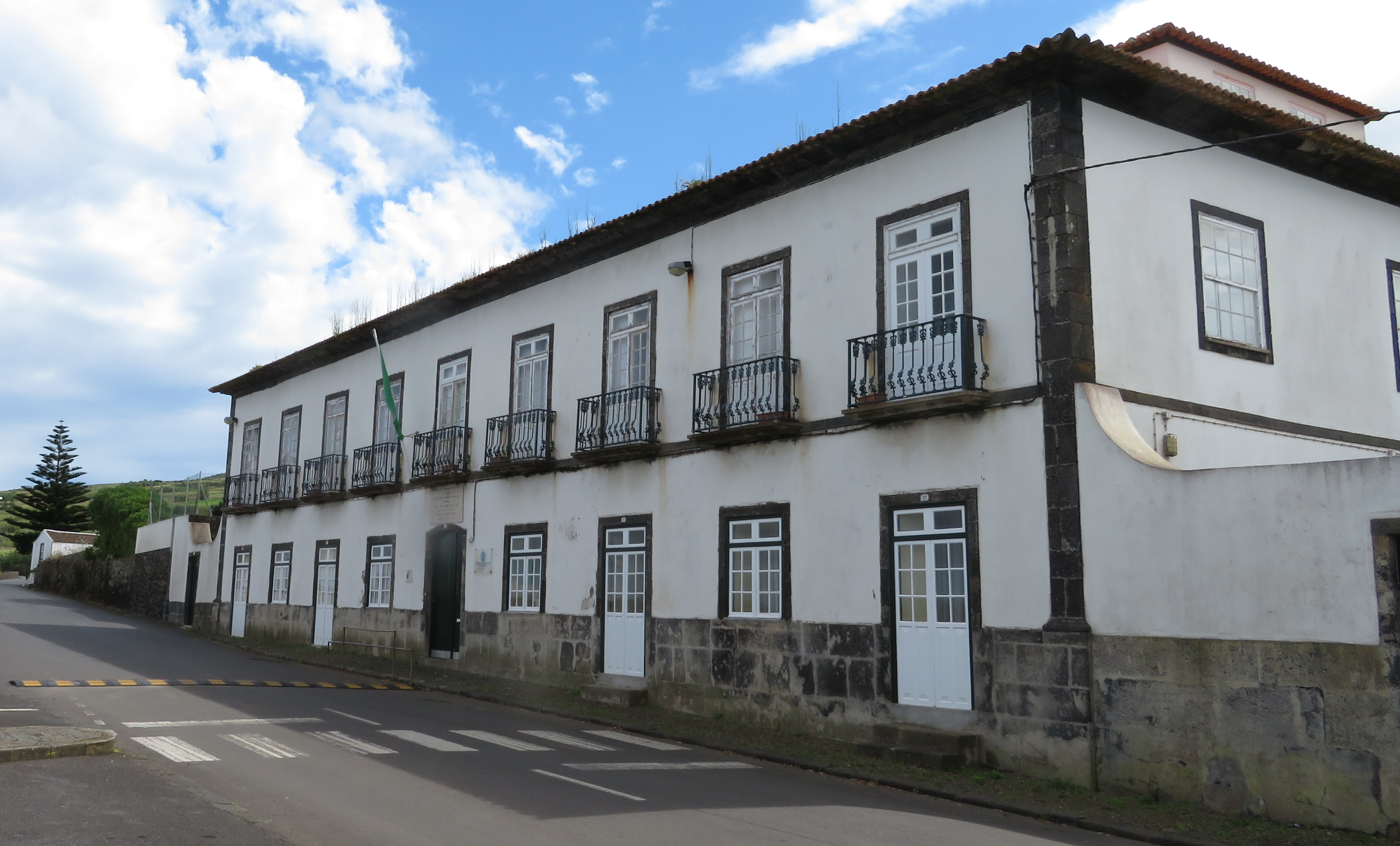 Casa solarenga, São Mateus da Praia, ilha Graciosa, Acores, Portugal